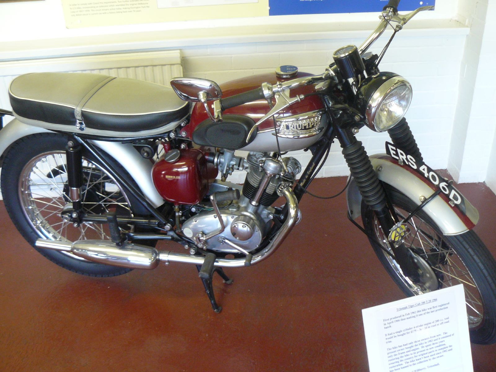 1966 model, running 200cc